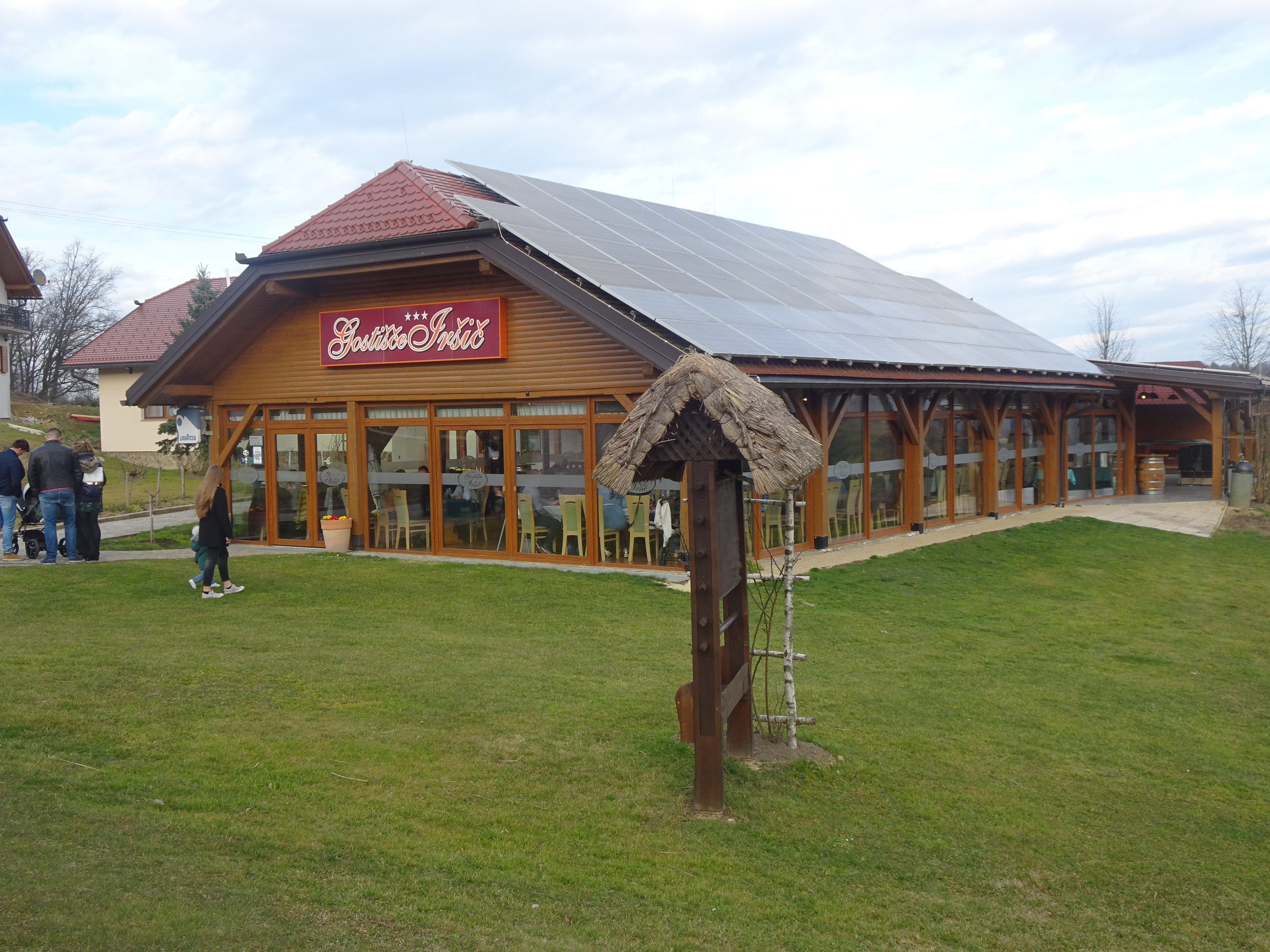 Žabljek, zaselek v Občini Slovenska Bistrica